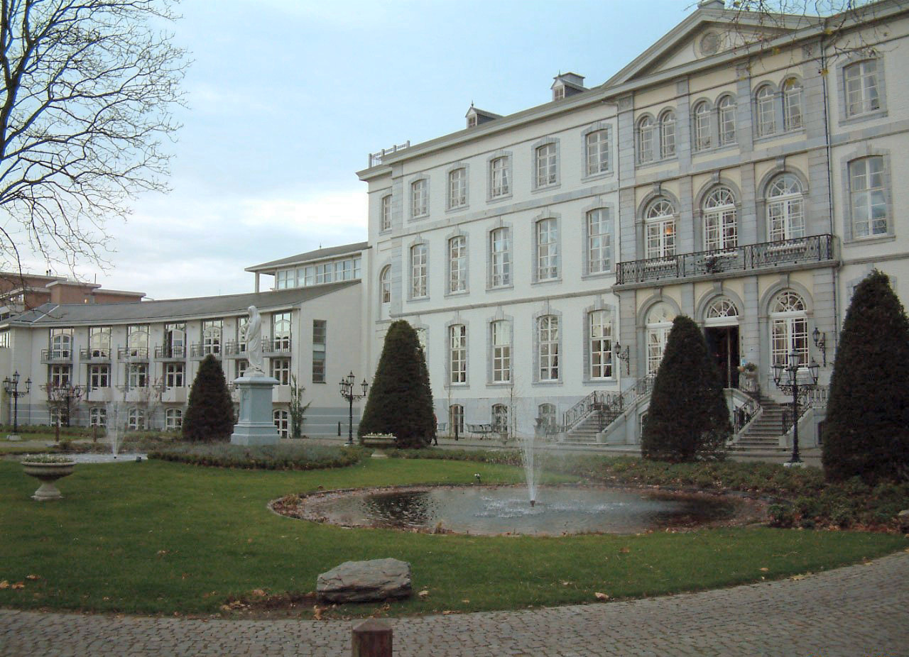 Huis Bloemendal te Vaals